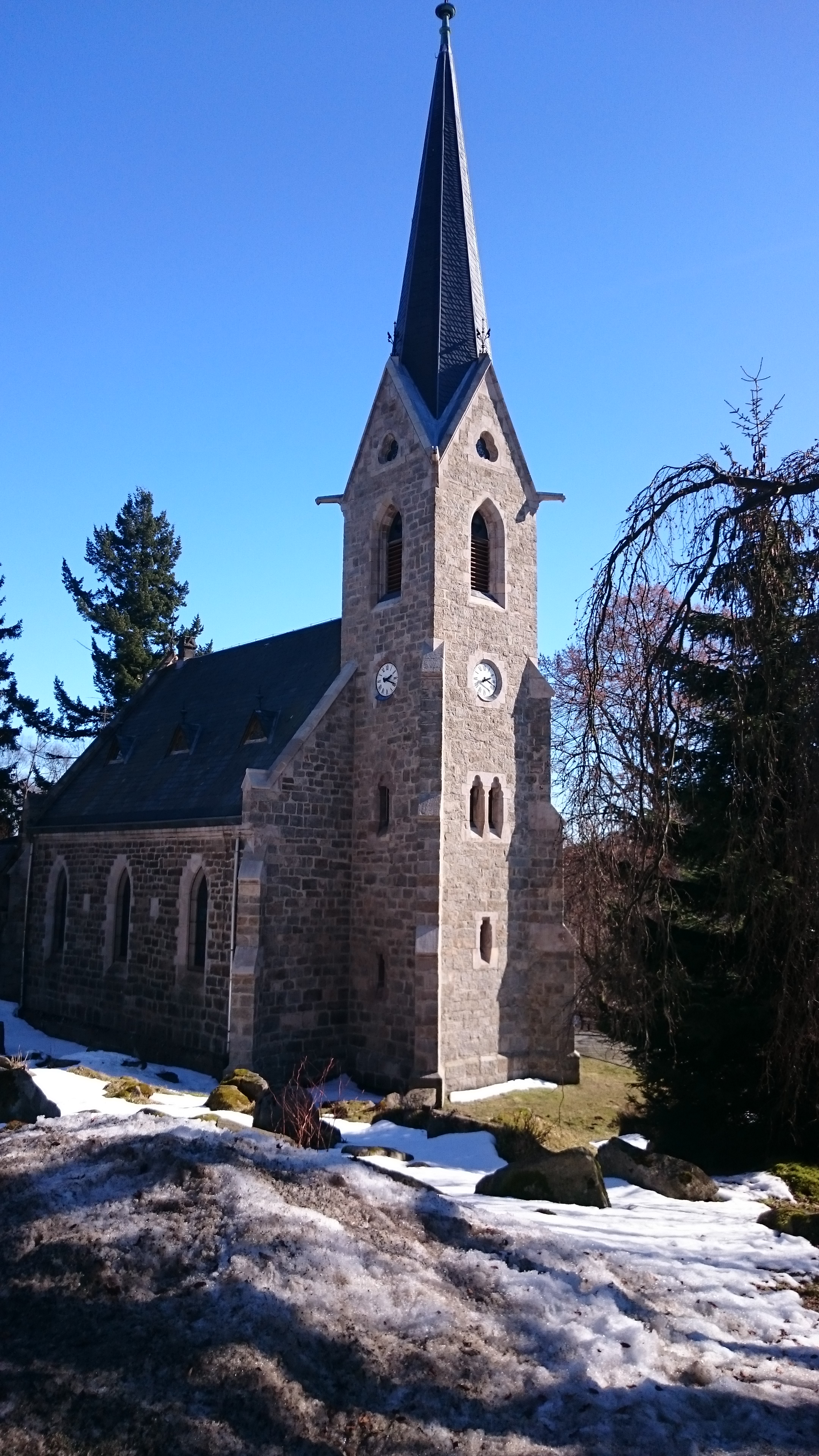 Schierke im Harz 12.03.2015 008